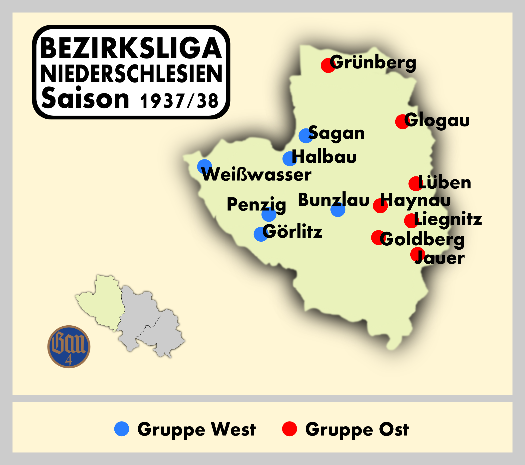 Spielorte der Bezirksliga Niederschlesien 1937/38.